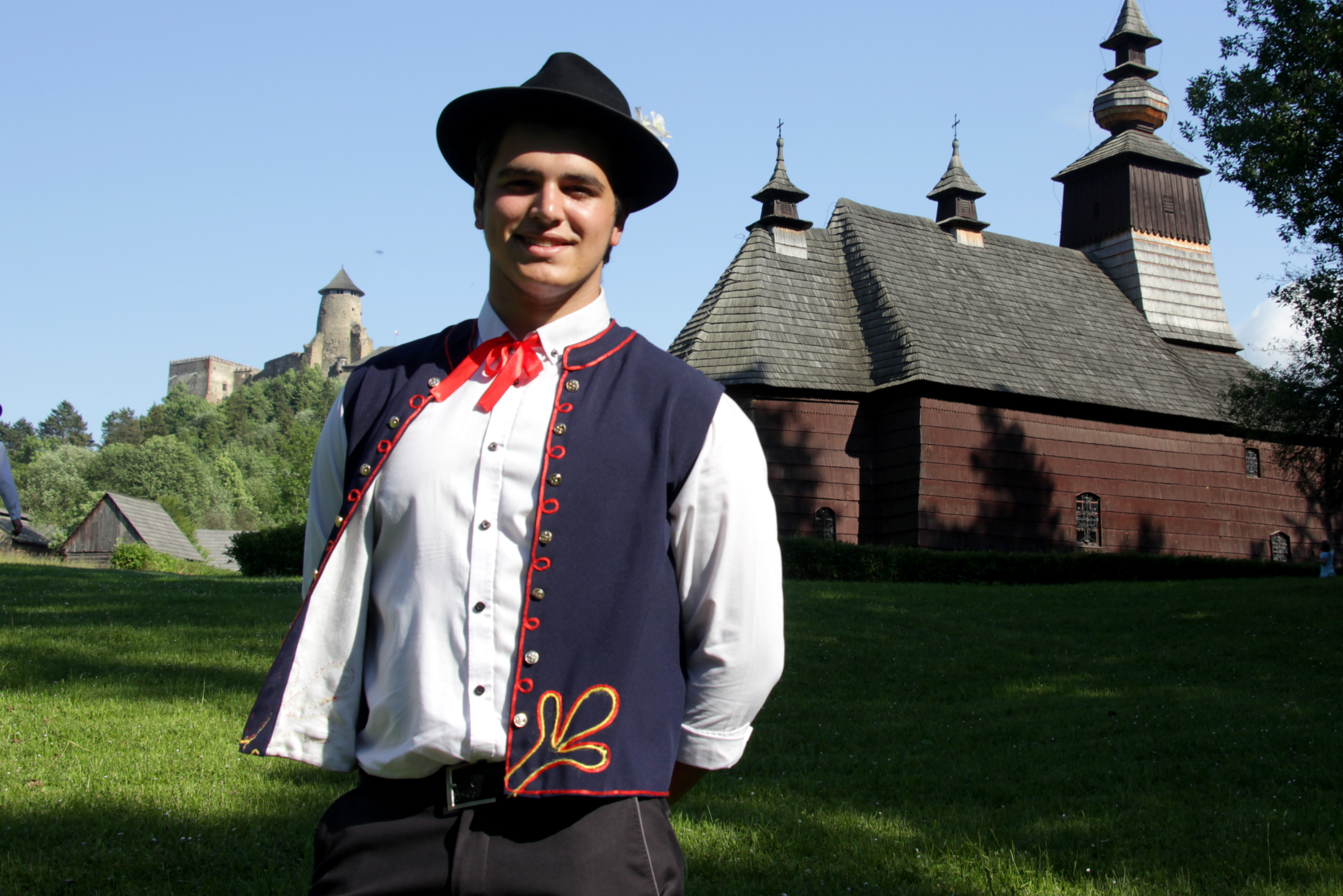 Strój męski mniejszości niemieckiej w Chmielnicy na Słowacji.